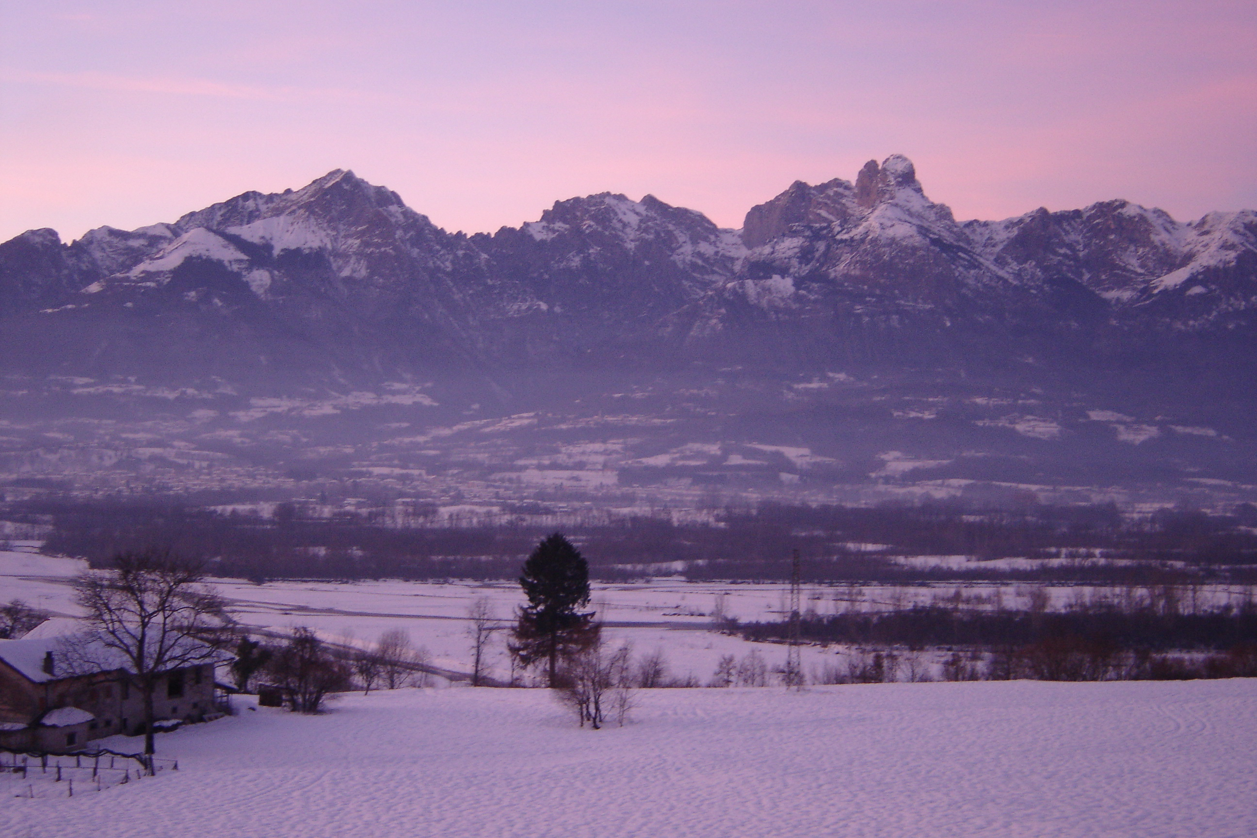 foto jacobus